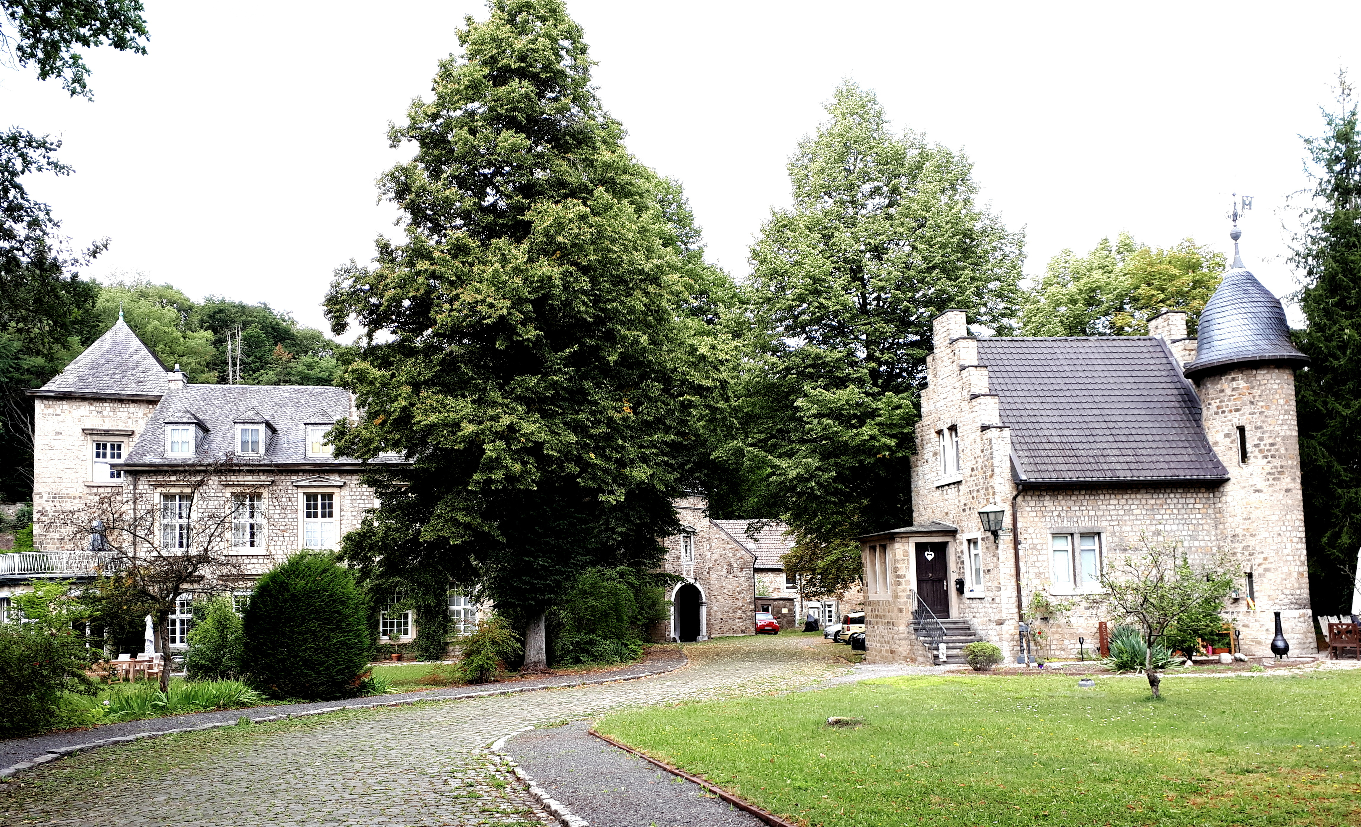 Kupferhof Unterster Hof (Kupferhof Bleibtreu) in Stolberg